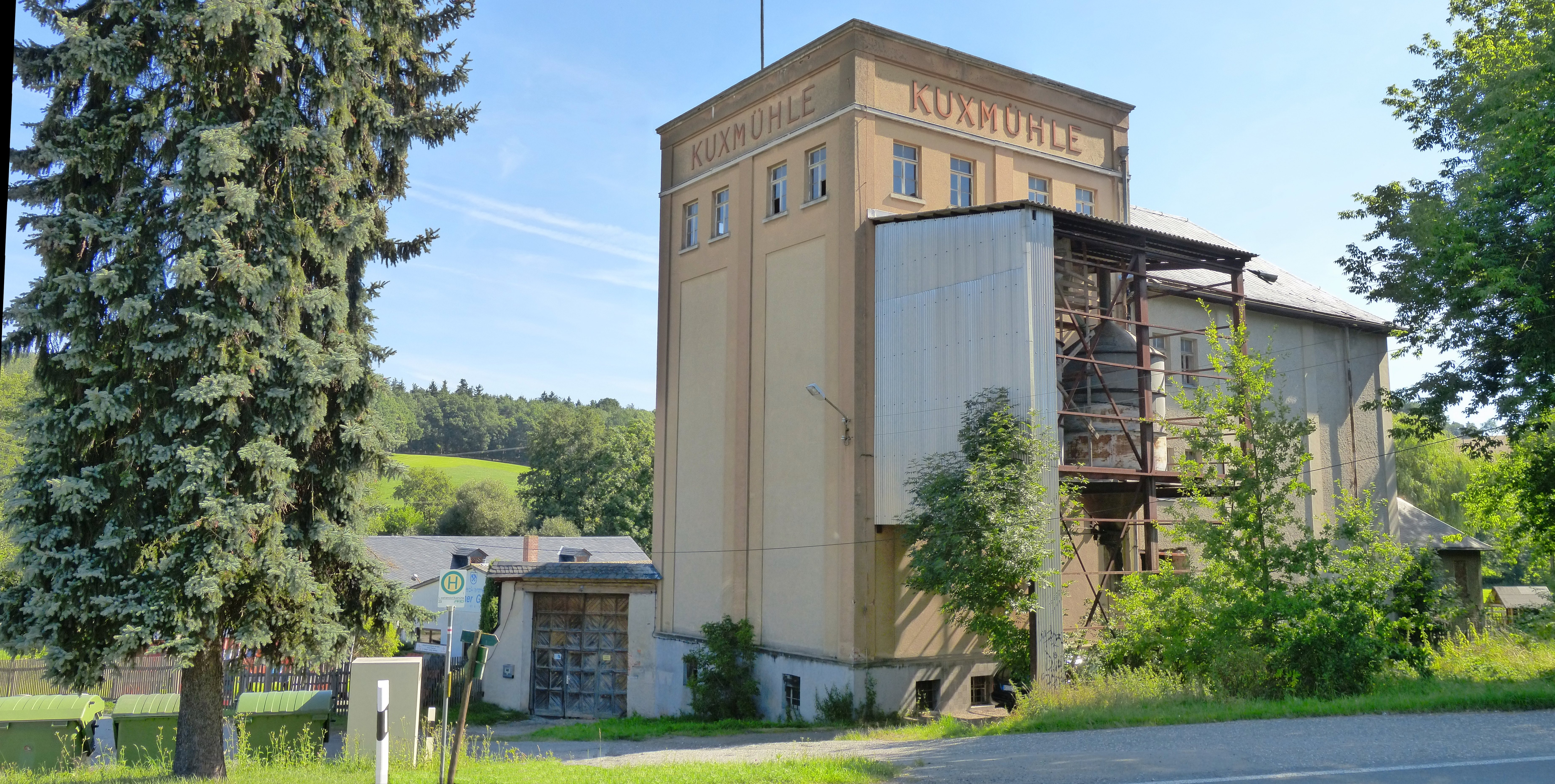 Die ehemalige Kuxmühle